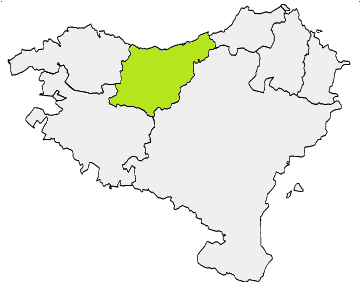 Situación de Gipuzkoa dentro de Vasconia.